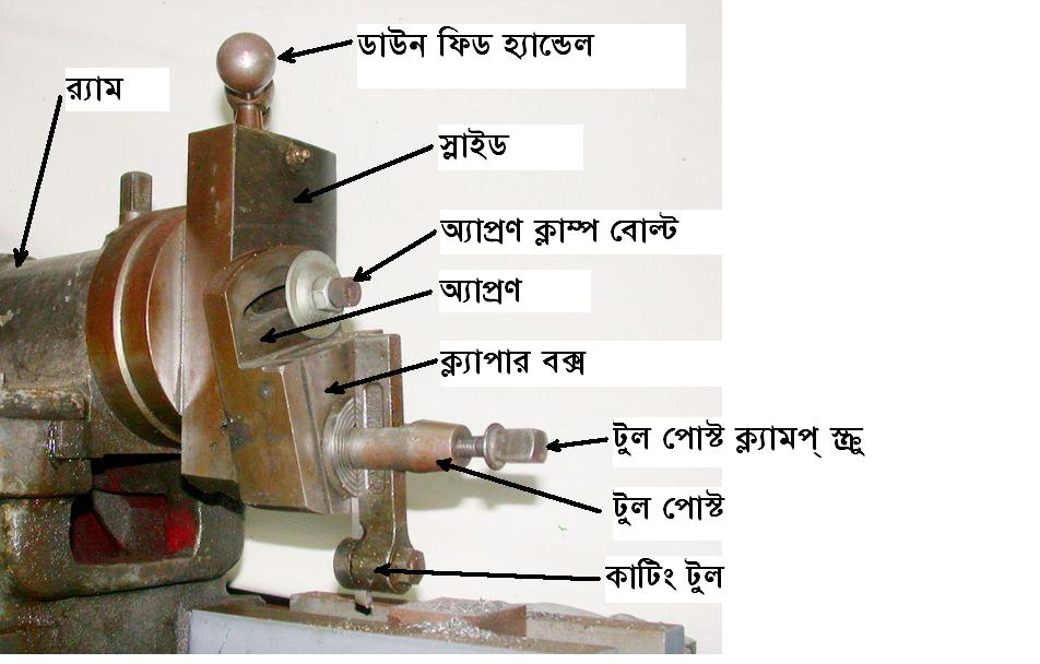 শ্যাপার মেশিন